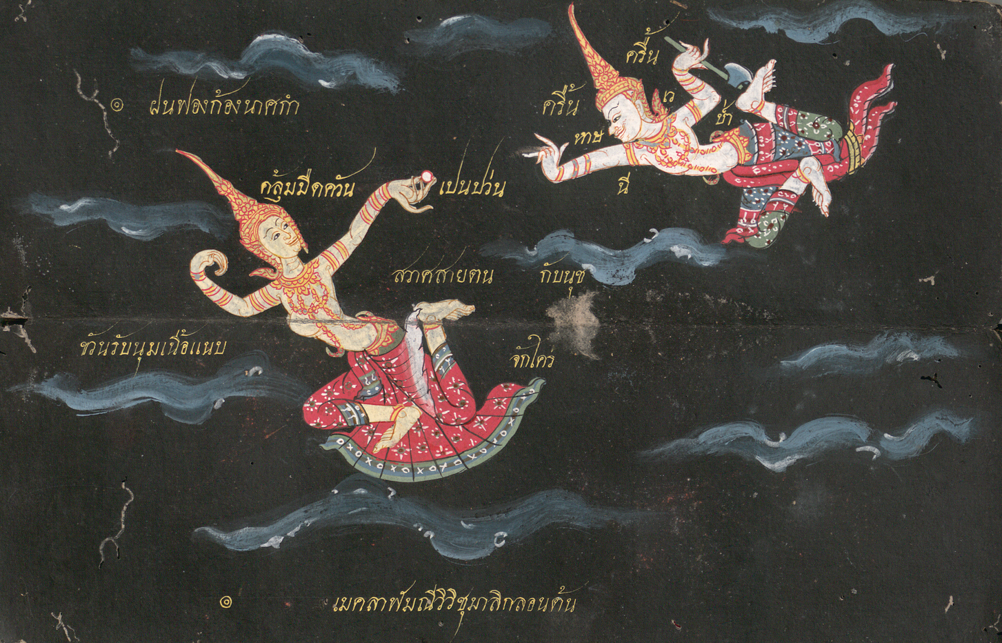 เมขลา-รามสูร